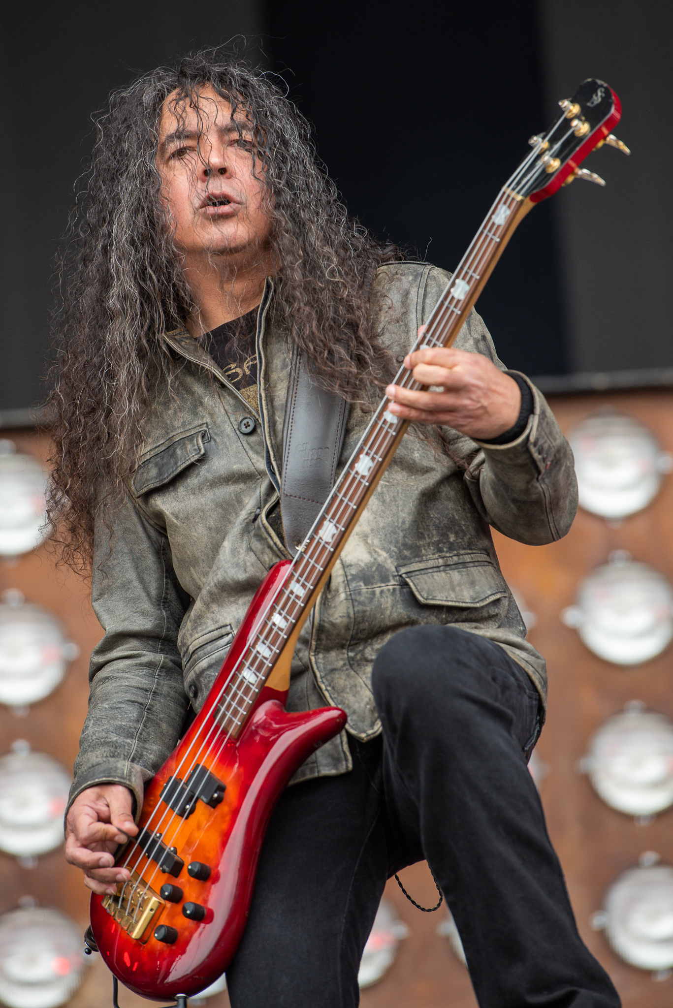 ARGO-Konzerte,Alice in Chains,Konzert,Livekonzert,Livemusik,Mike Inez,Musik,RiP,Rock im Park 2019,Zeppelin Stage